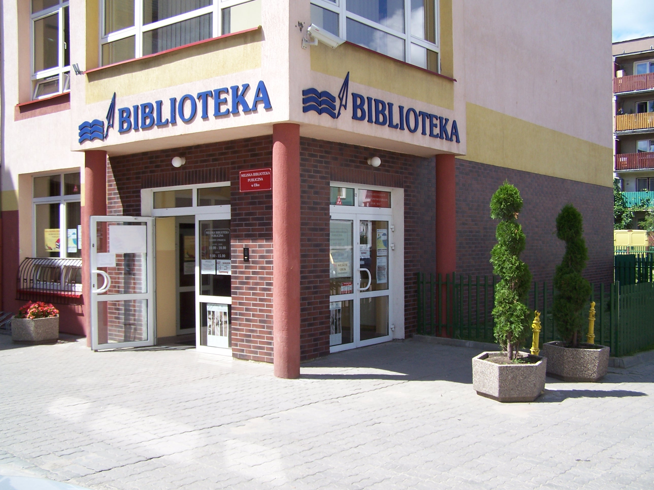 Miejska Biblioteka Publiczna w Ełku